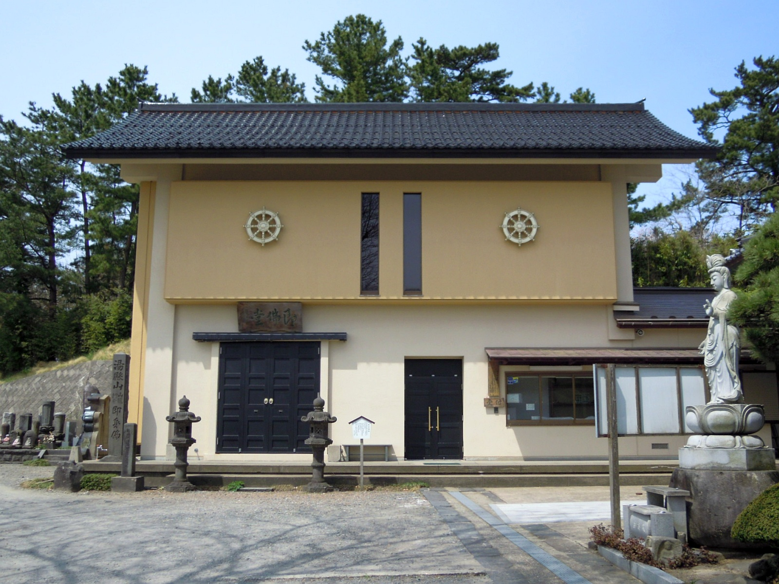 山形県酒田市にある海向寺の即身佛堂